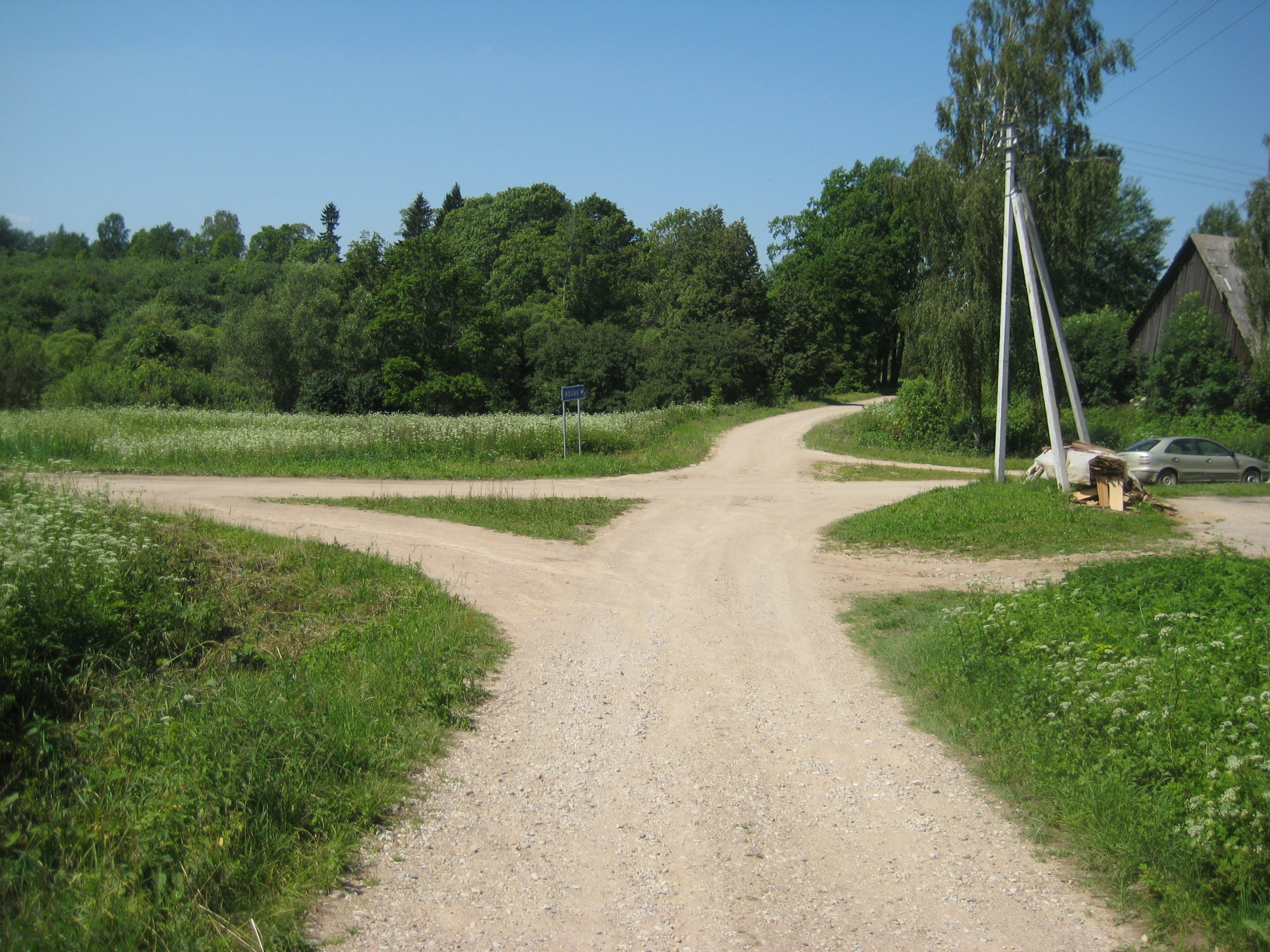 Beržininkai 30265, Lithuania